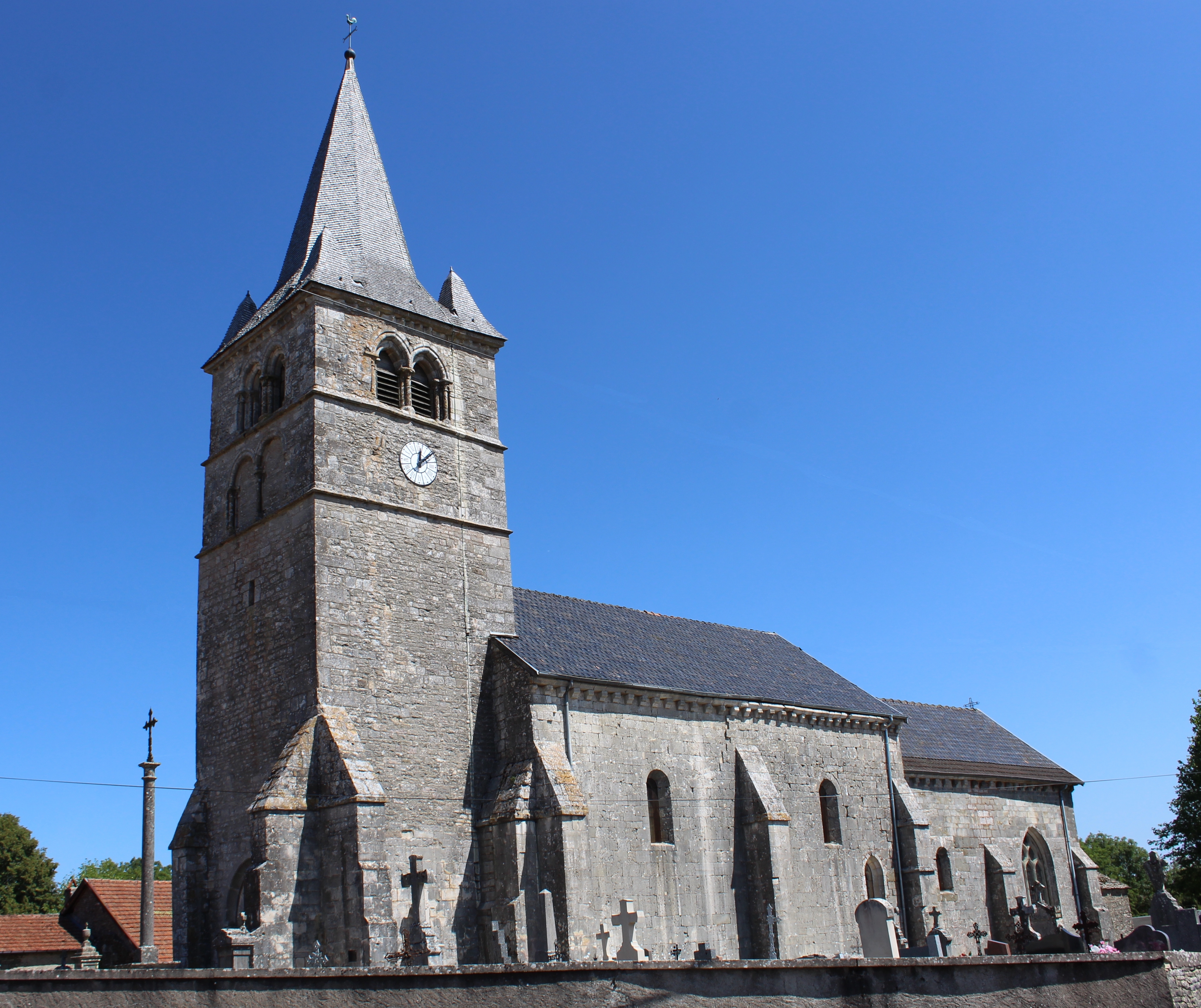 L'église de Chassigny